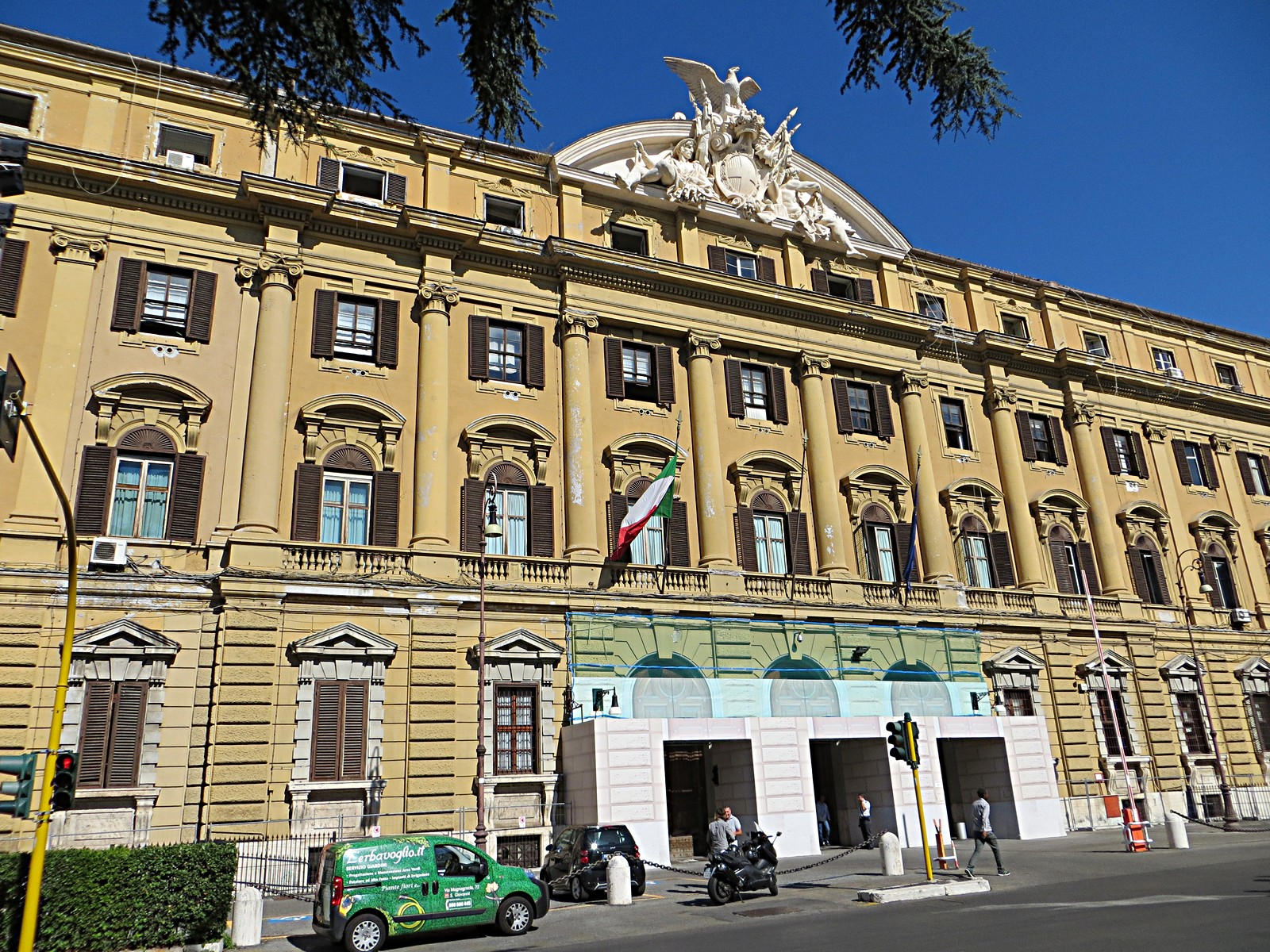 Museo Numismatico della Zecca Italiana